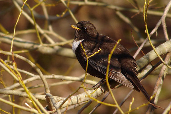 Ring ouzel (Turdus torquatus), adult male. Photographed in Vårberg, Stockholm, Södermanland, Sweden.